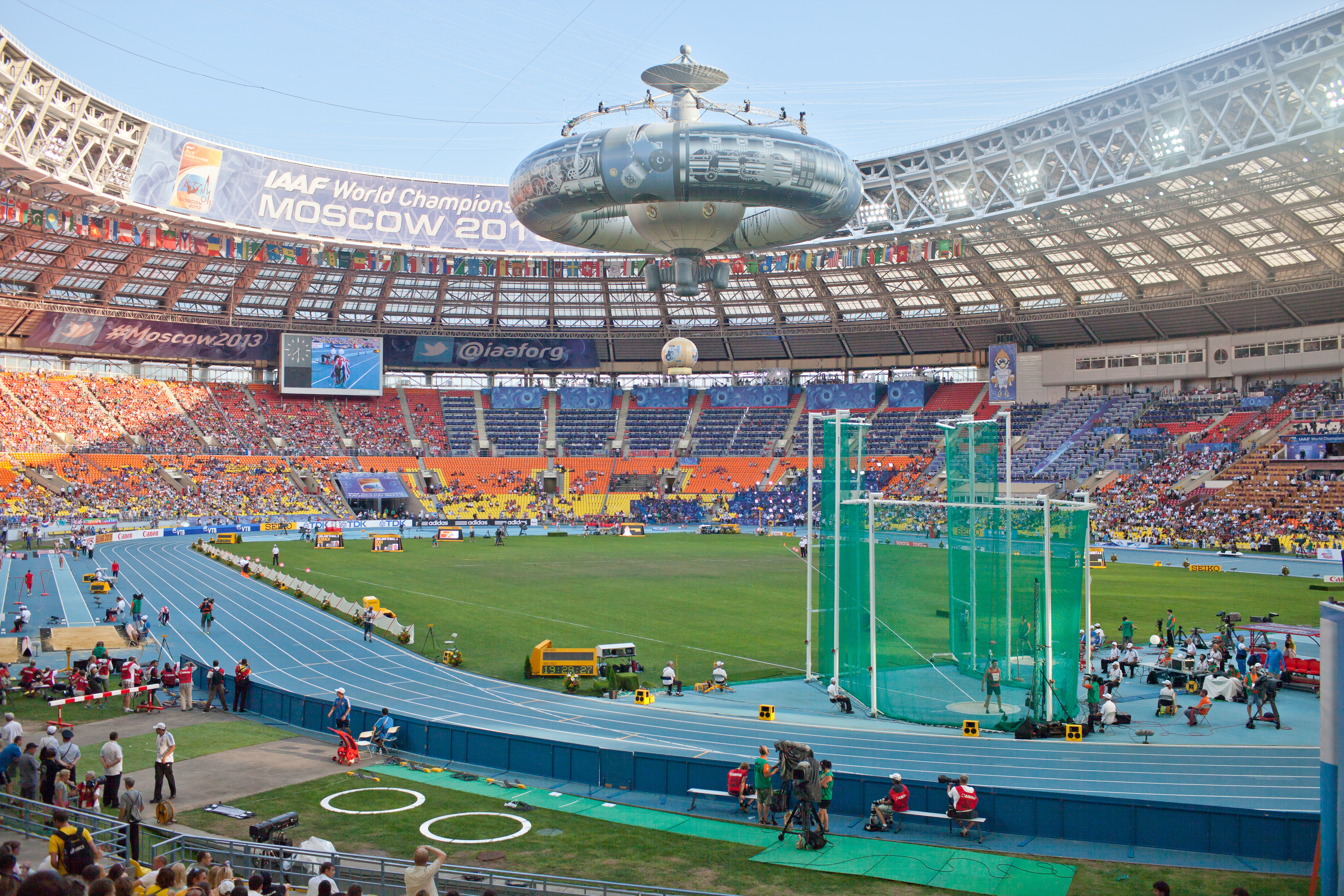 Первый день Чемпионата мира по легкой атлетике в Москве